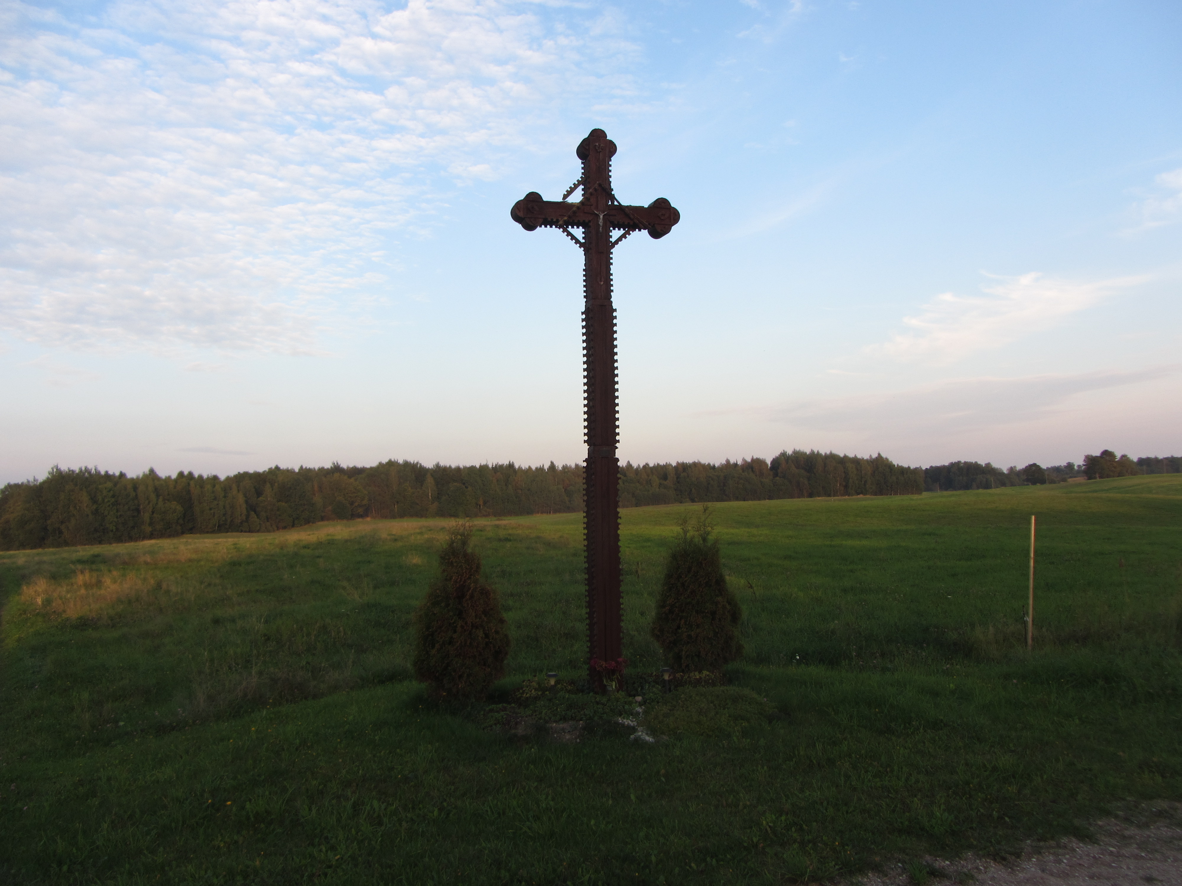 Kuktiškių sen., Lithuania